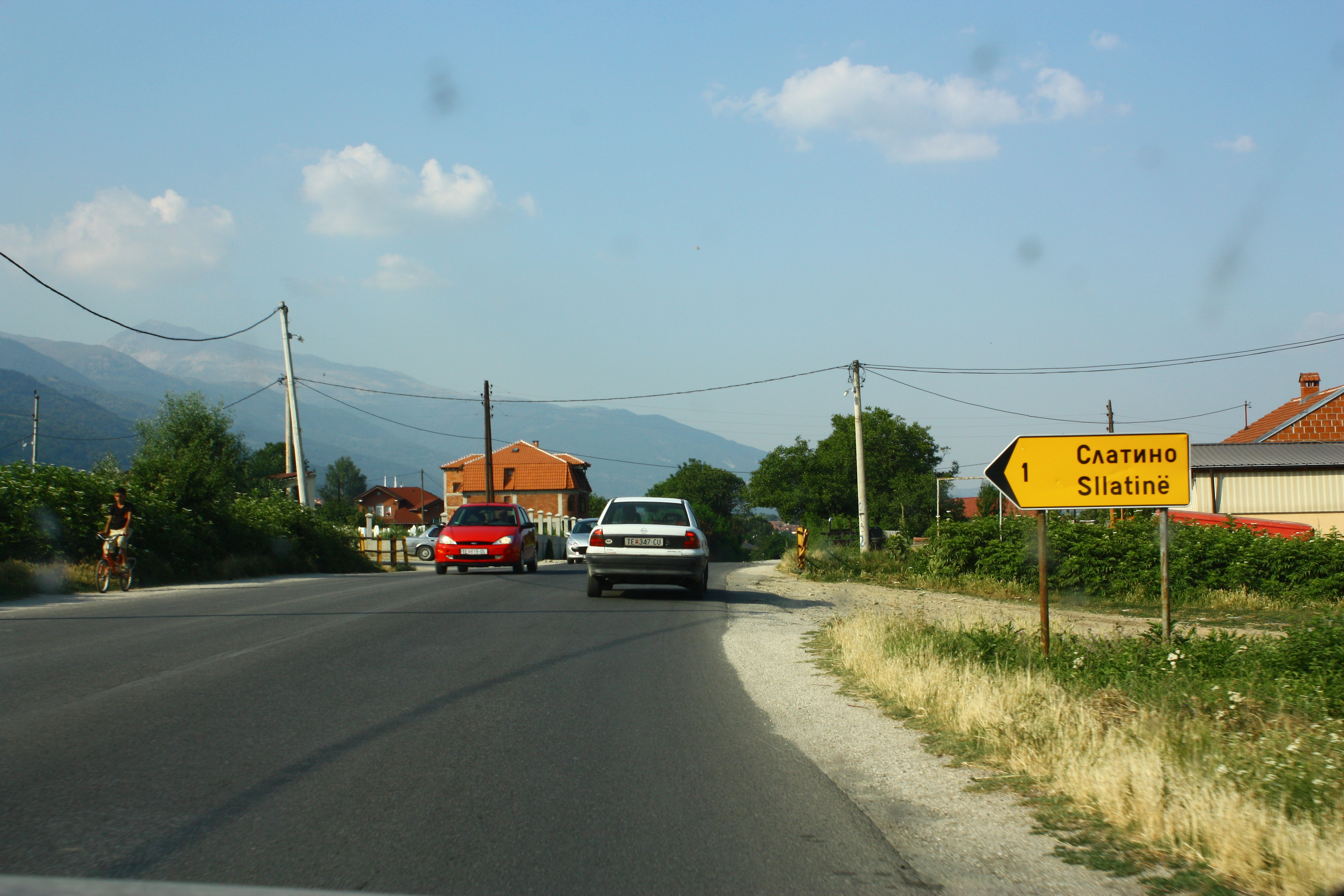 Slatino, near Tetovo